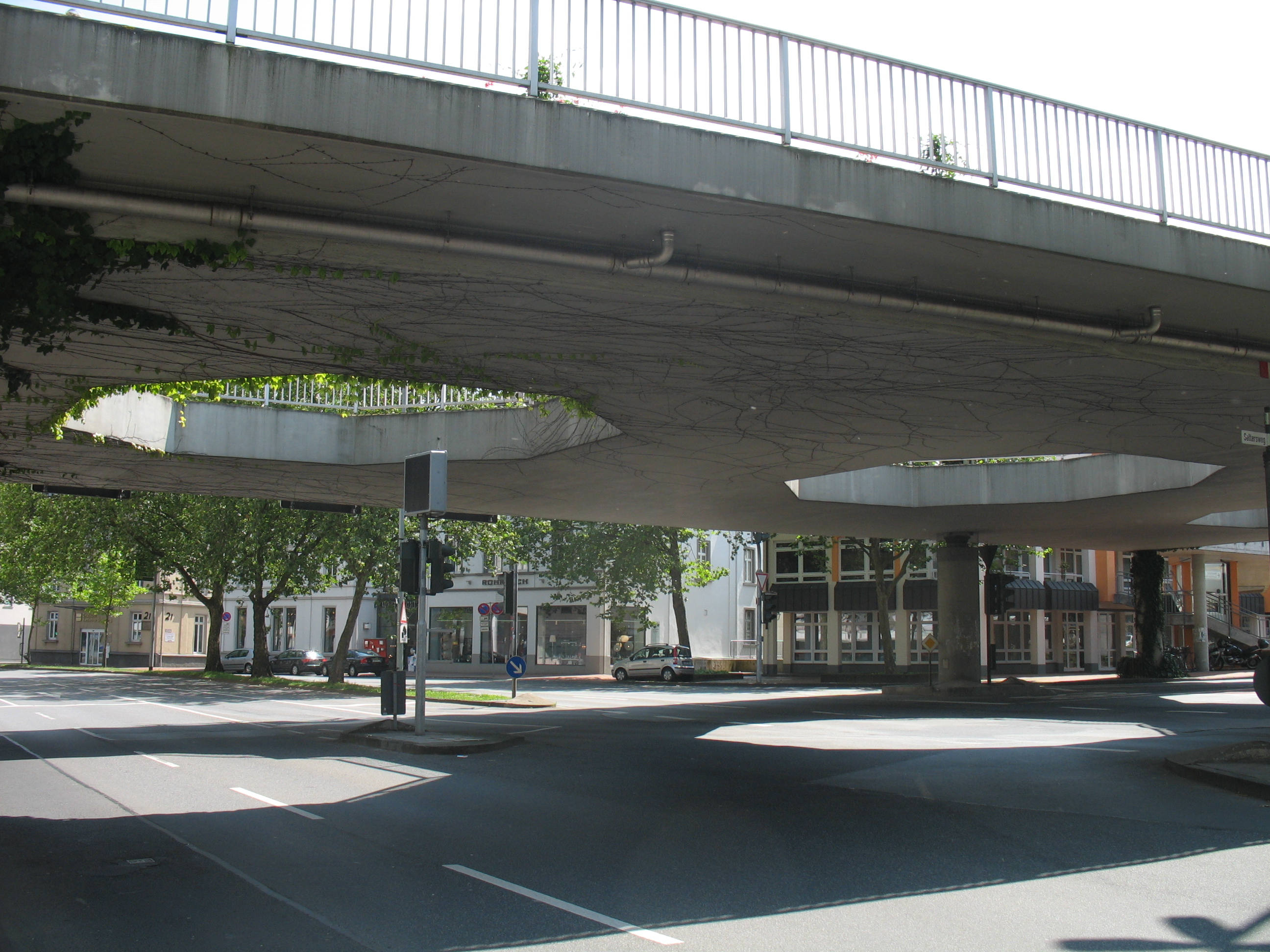 "Elefantenklo", eine Fußgängerüberführung am Südende der Gießener Innenstadt.